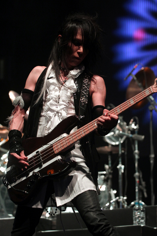 HSBC Brasil - São Paulo/SP - 11/09/2011